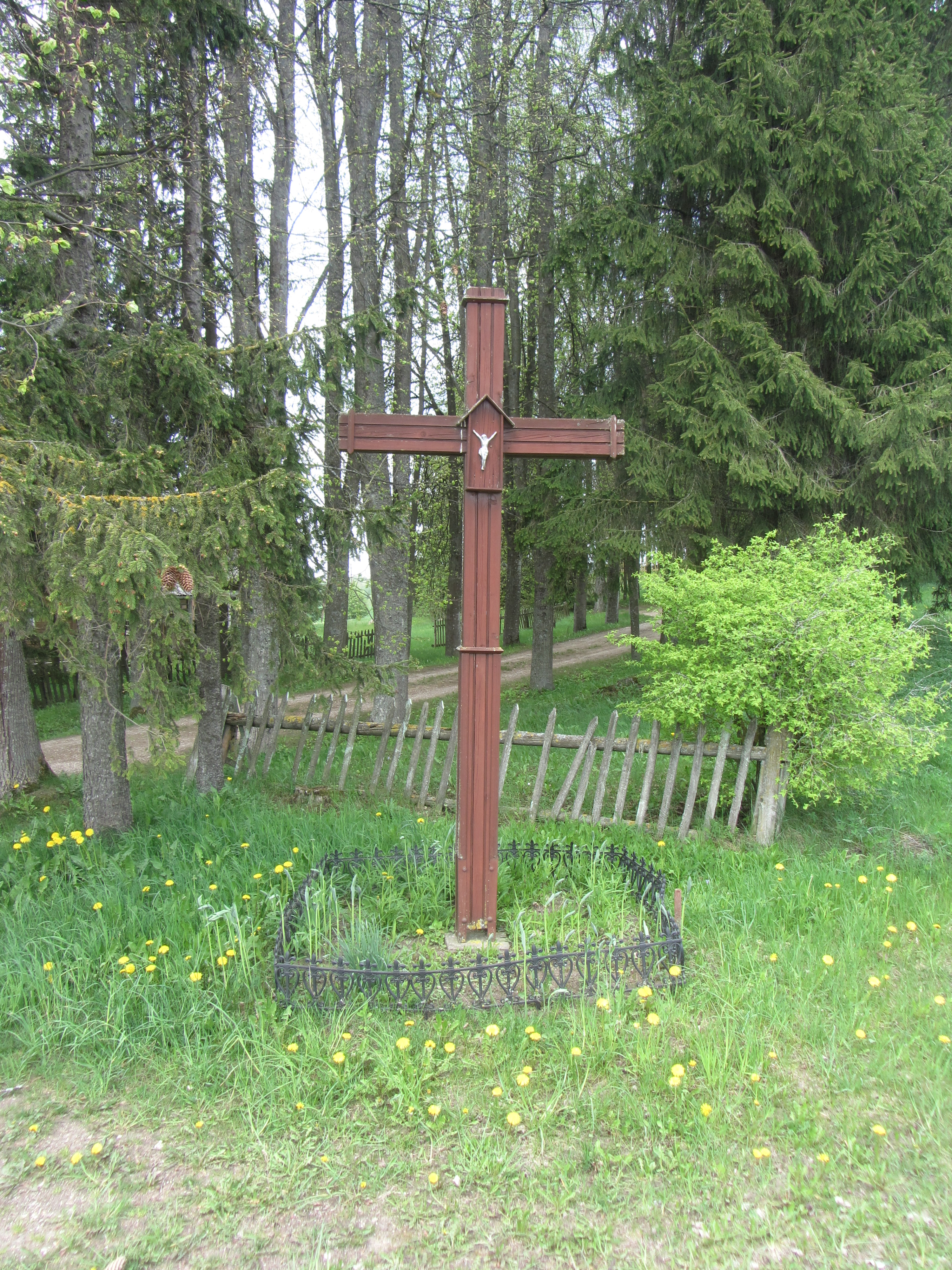 Kurklių sen., Lithuania